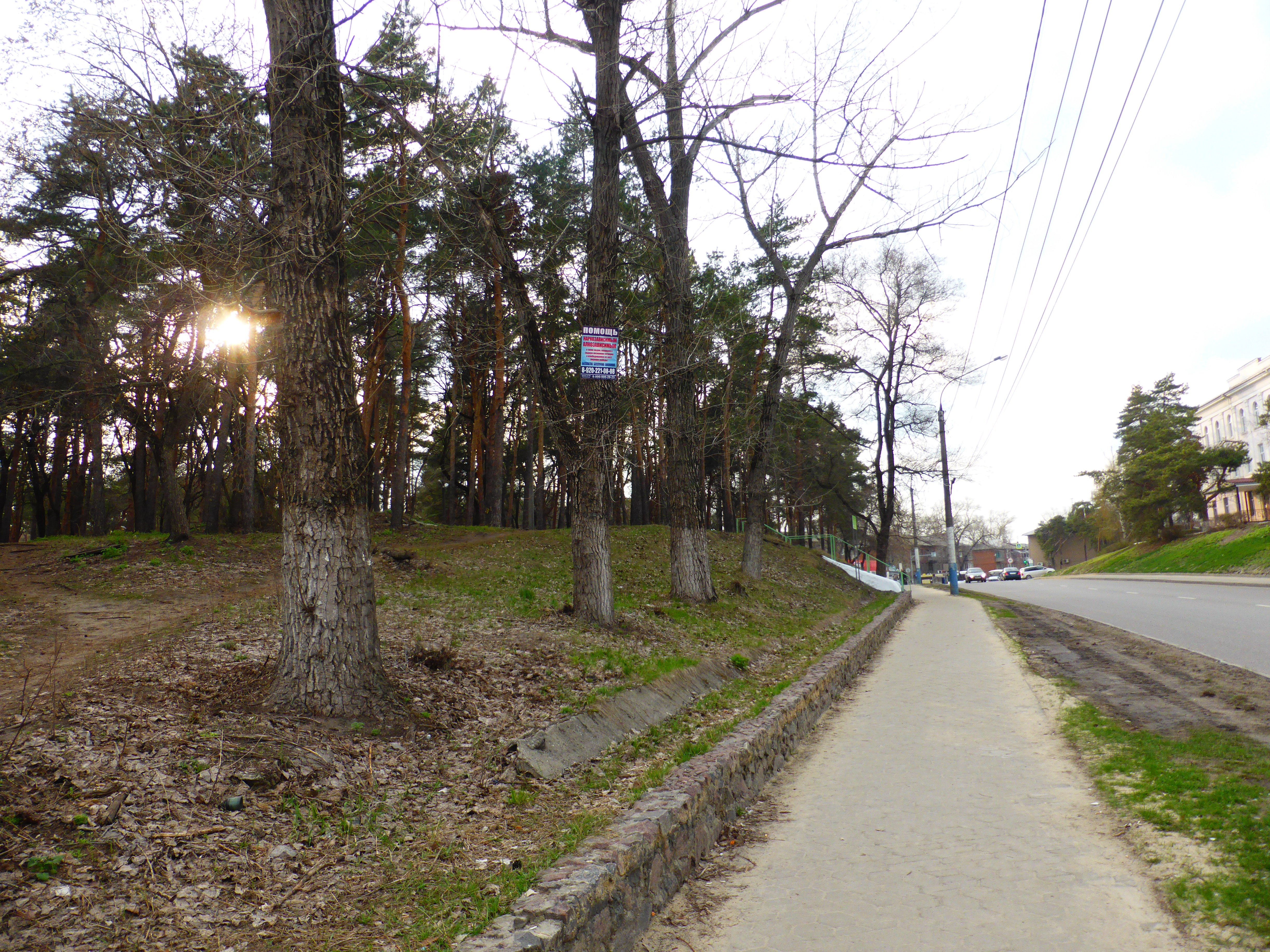 Сквер Лесная сказка: улица Богдана Хмельницкого, 26Д, Воронеж, Воронежская область This image is related to the protected area of Russia number 3620017